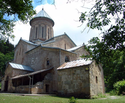 Kintsvisi Monastery in Shida Kartli Georgia